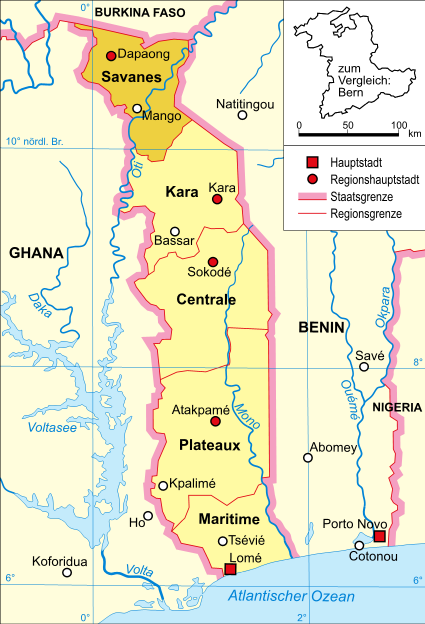 Politische Karte Togos (Region Savanes hervorgehoben)